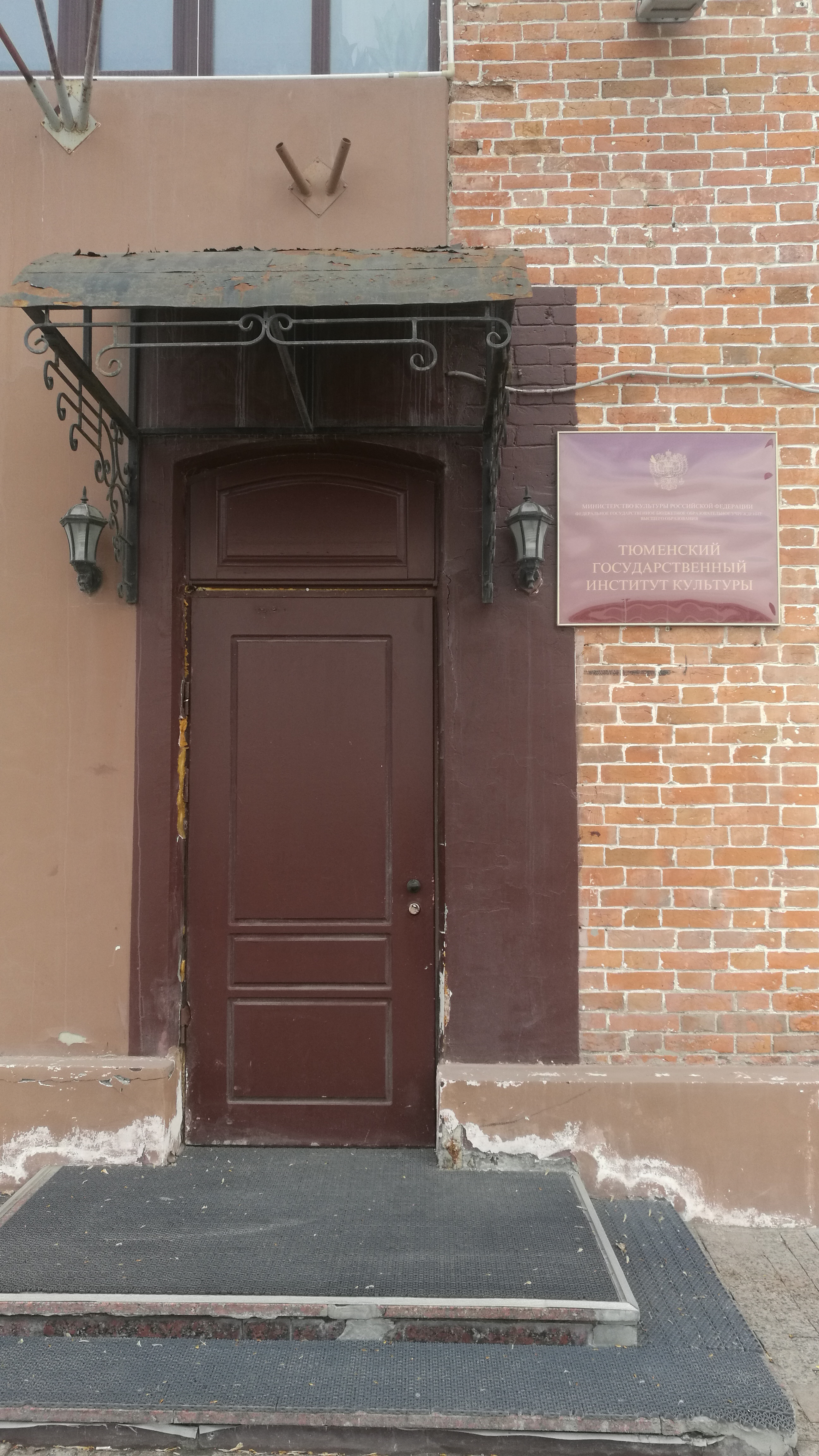 Gastokorto. Tjumeno, Rusio.